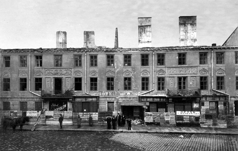 Стара будівля львівського готелю «Жорж» у процесі розбирання, 1899 рік.